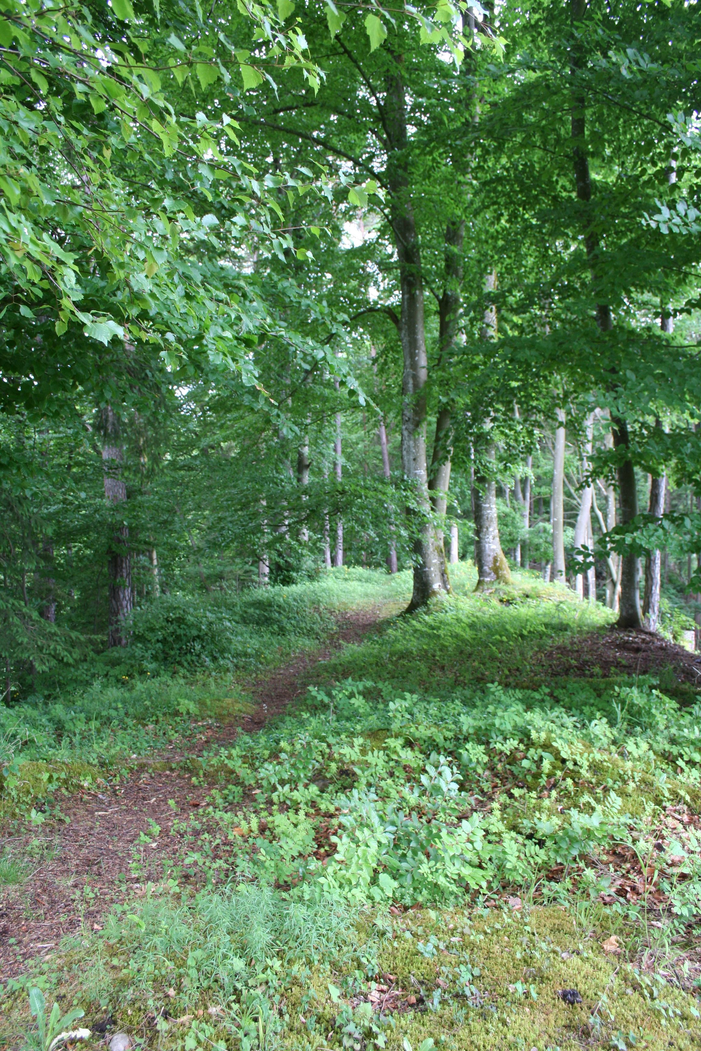 Lage der Burg Bichelsee